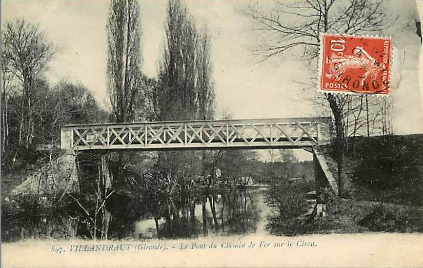 Villandraut